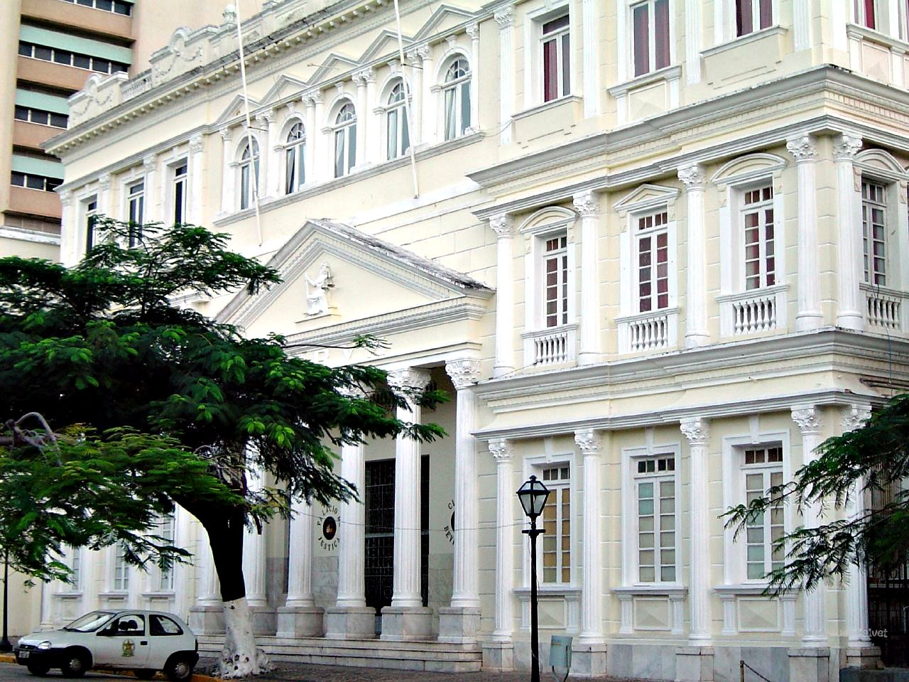 Fórum na Praça São Pedro no Centro de São Luís